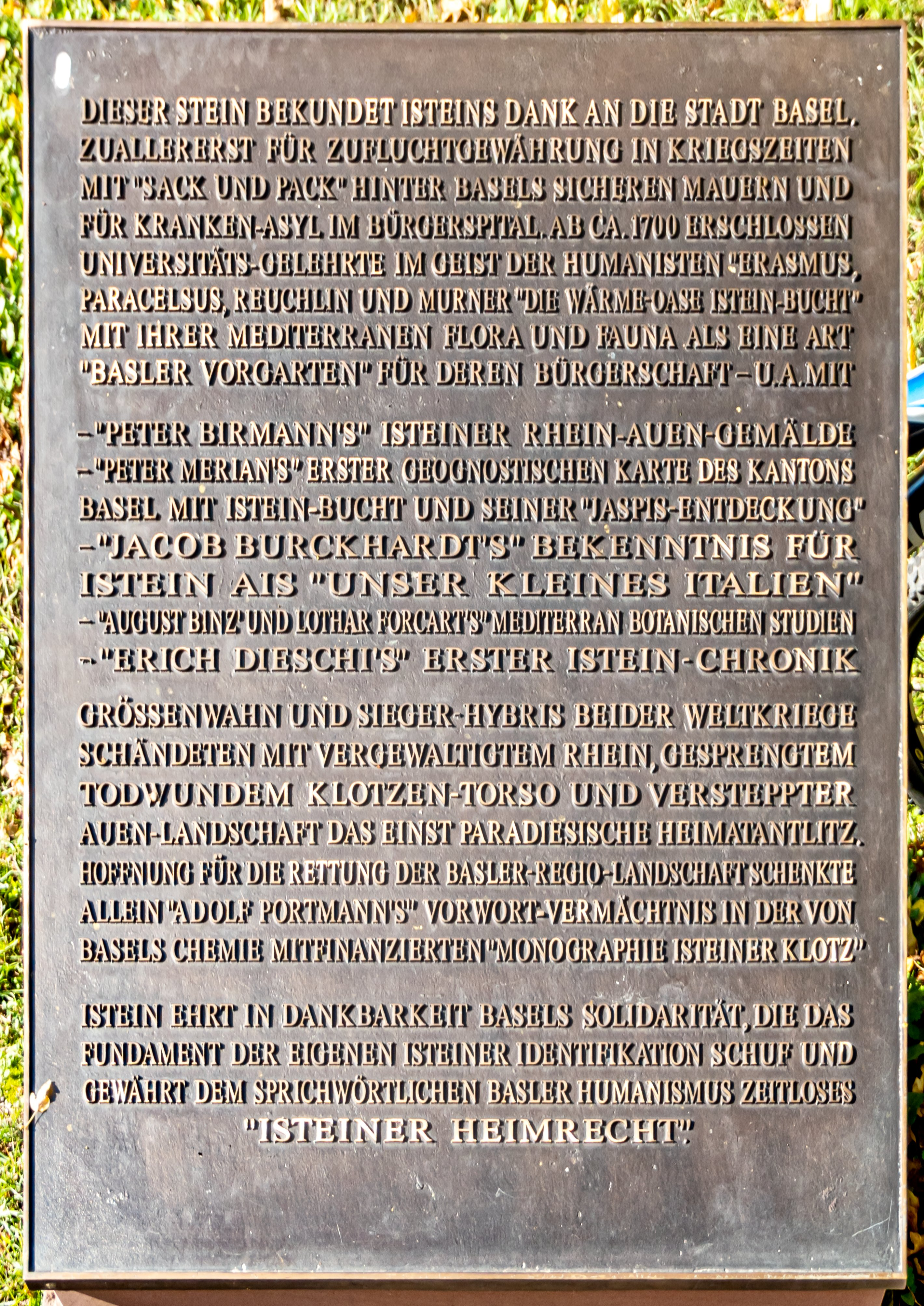 Bilder vom Isteiner Klotz am 20. 10. 2019